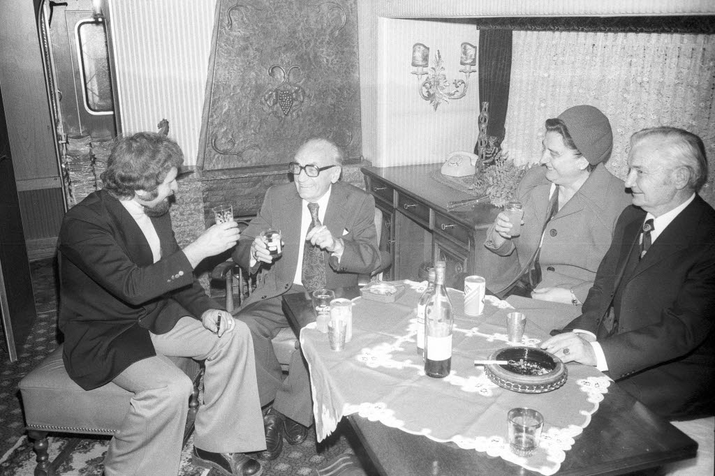 auf dem Wilhelmplatz. Der Schauspieler Henry Vahl (2.v.l.) ist zu Besuch.